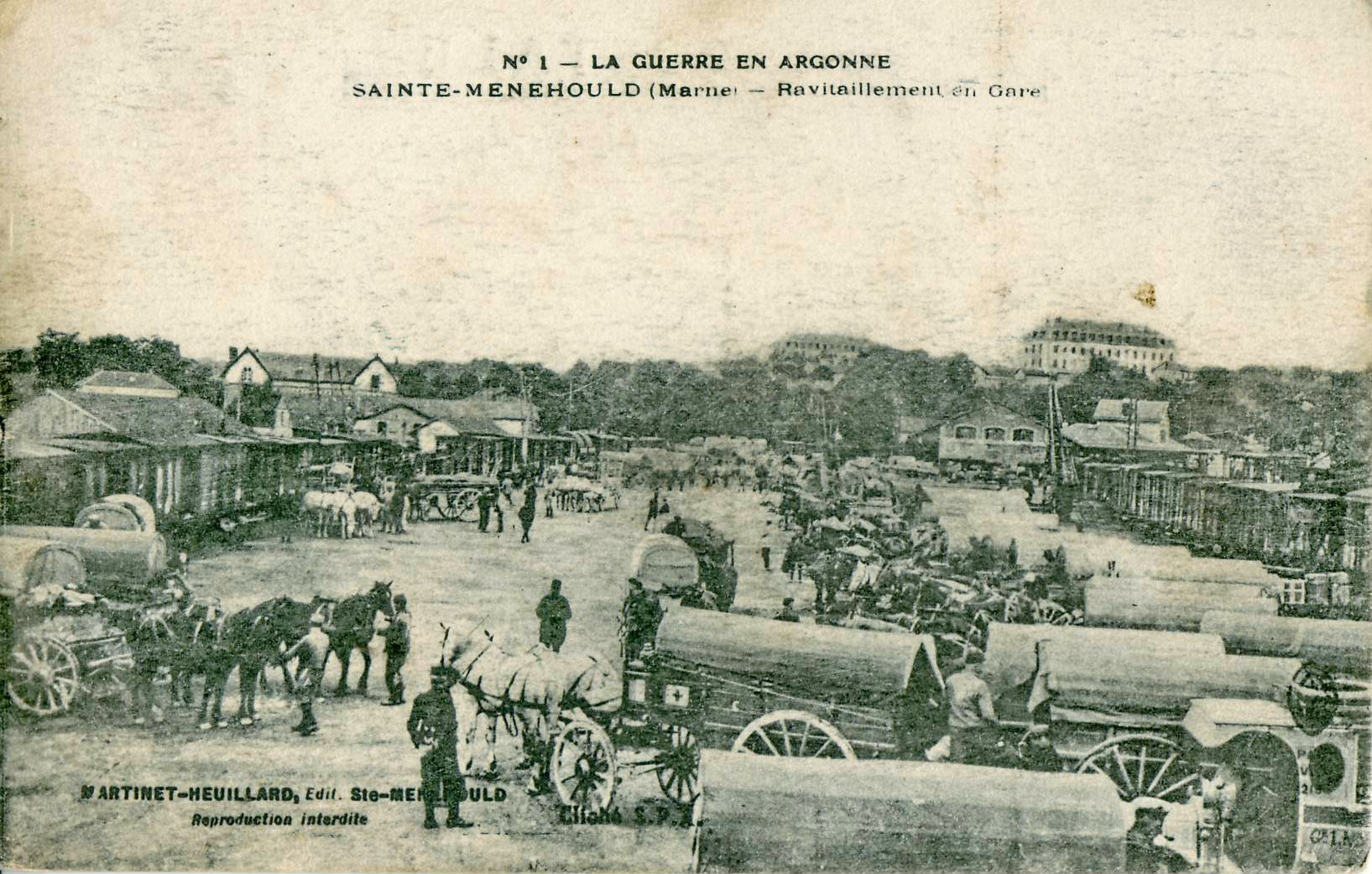 Carte postale ancienne éditée par Martinet-Heuillard, éditeur à Sainte-Menehould, n°1La Guerre en Argonne - SAINTE-MENEHOULD - Ravitaillement en gare